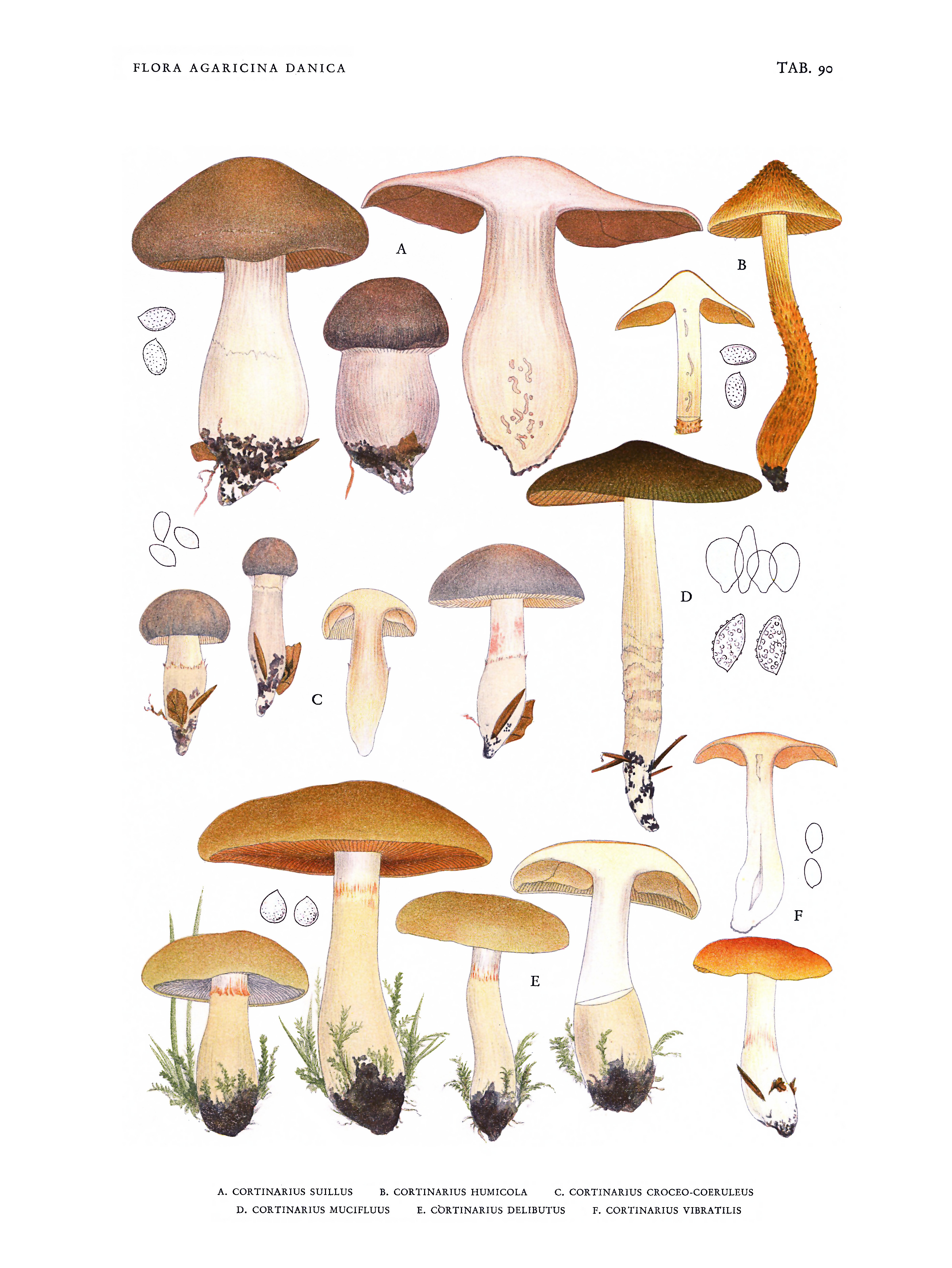 Jakob E. Lange: Flora agaricina Danica. Vol. 3; TAB. 90 A. Cortinarius suillus B. Cortinarius humicola C. Cortinarius croceo-caeruleus D. Cortinarius mucifluus E. Cortinarius delibutus